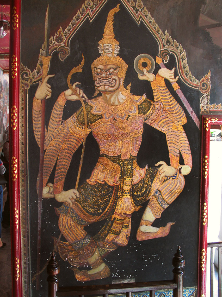 Chakravarti (Thai: ท้าวจักรวรรดิ), a yaksha (giant or demon) character from Thai Ramakien. Mural in Wat Phra Kaeo, Bangkok, Thailand